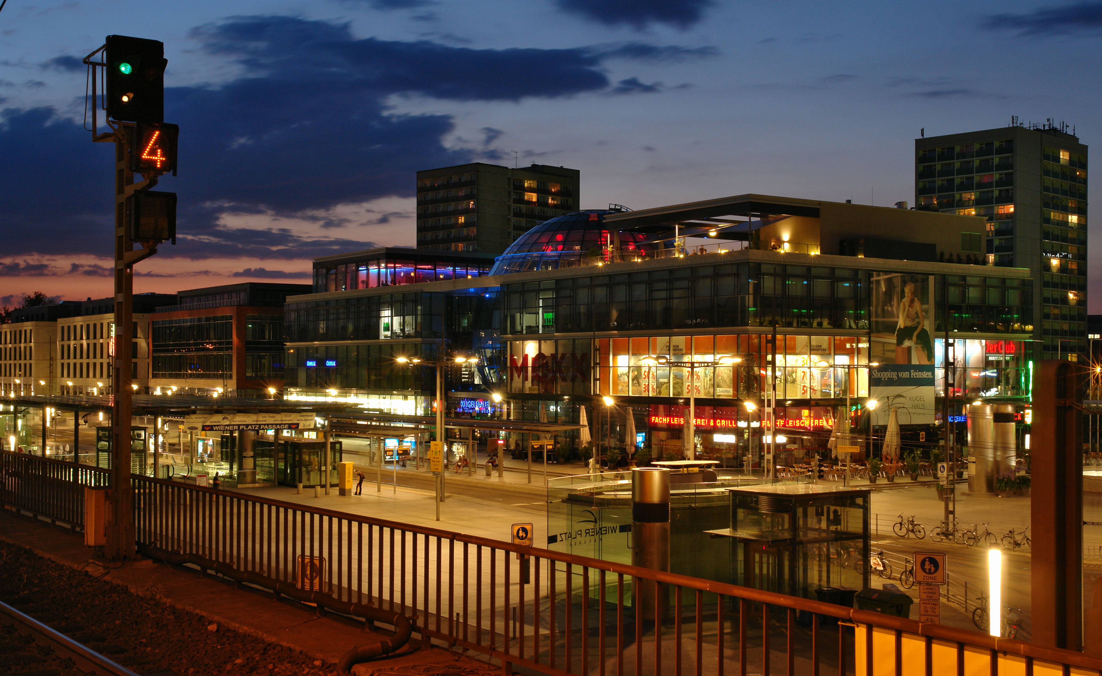 Blick vom Haupthahnhof auf das neue Kugelhaus